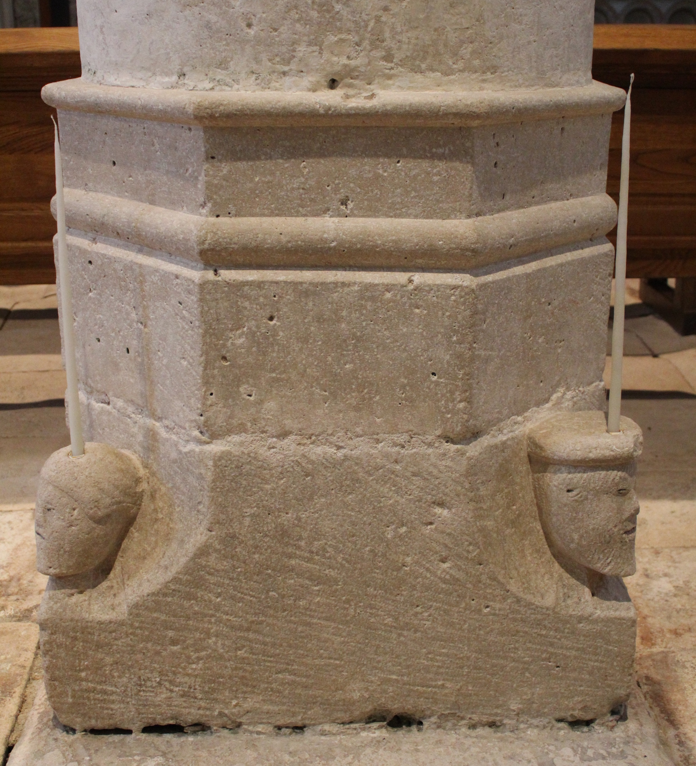 base colonne porte cierge creuë